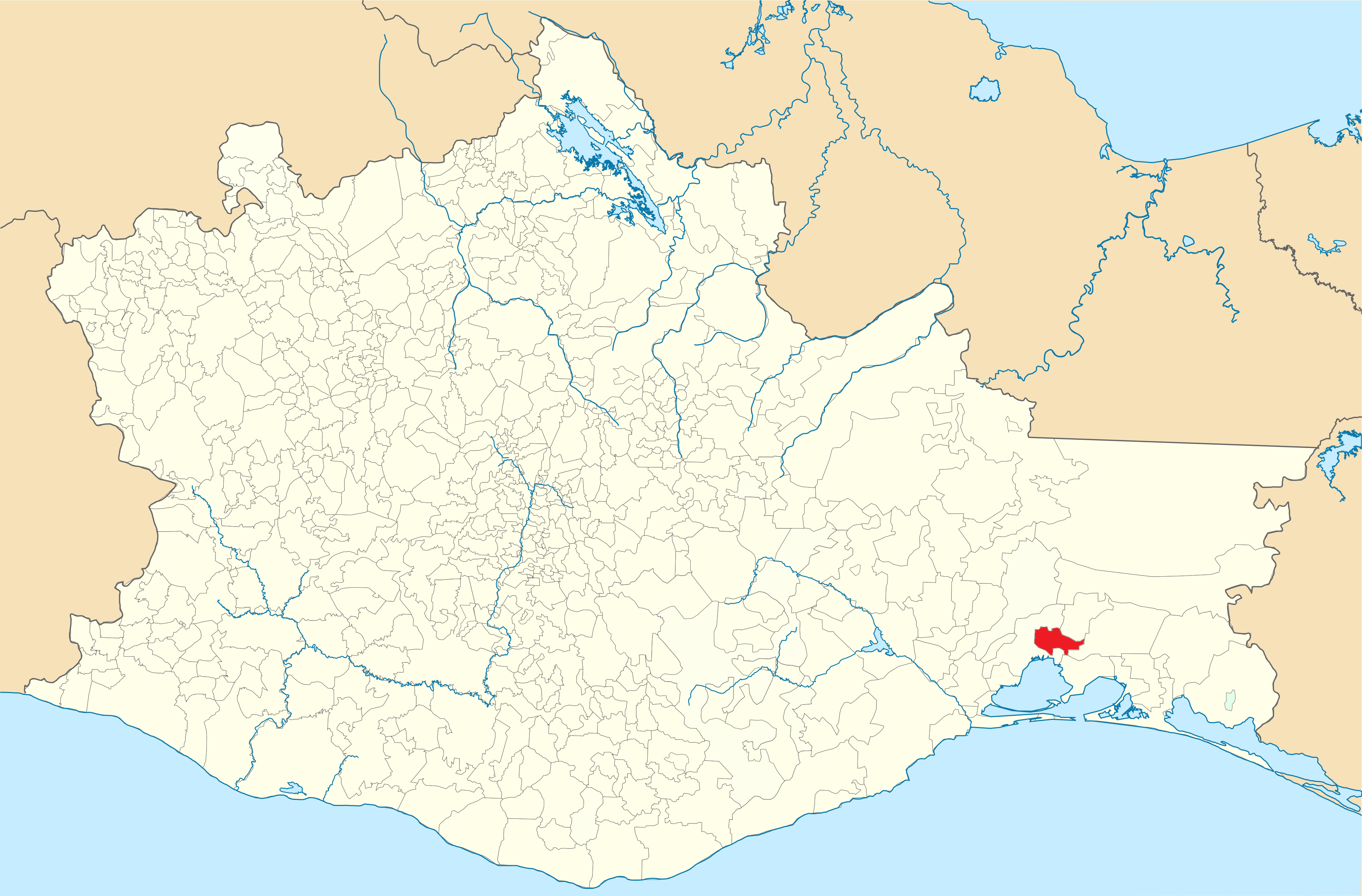 Localizacion del Municipio de Unión Hidalgo en el estado de Oaxaca